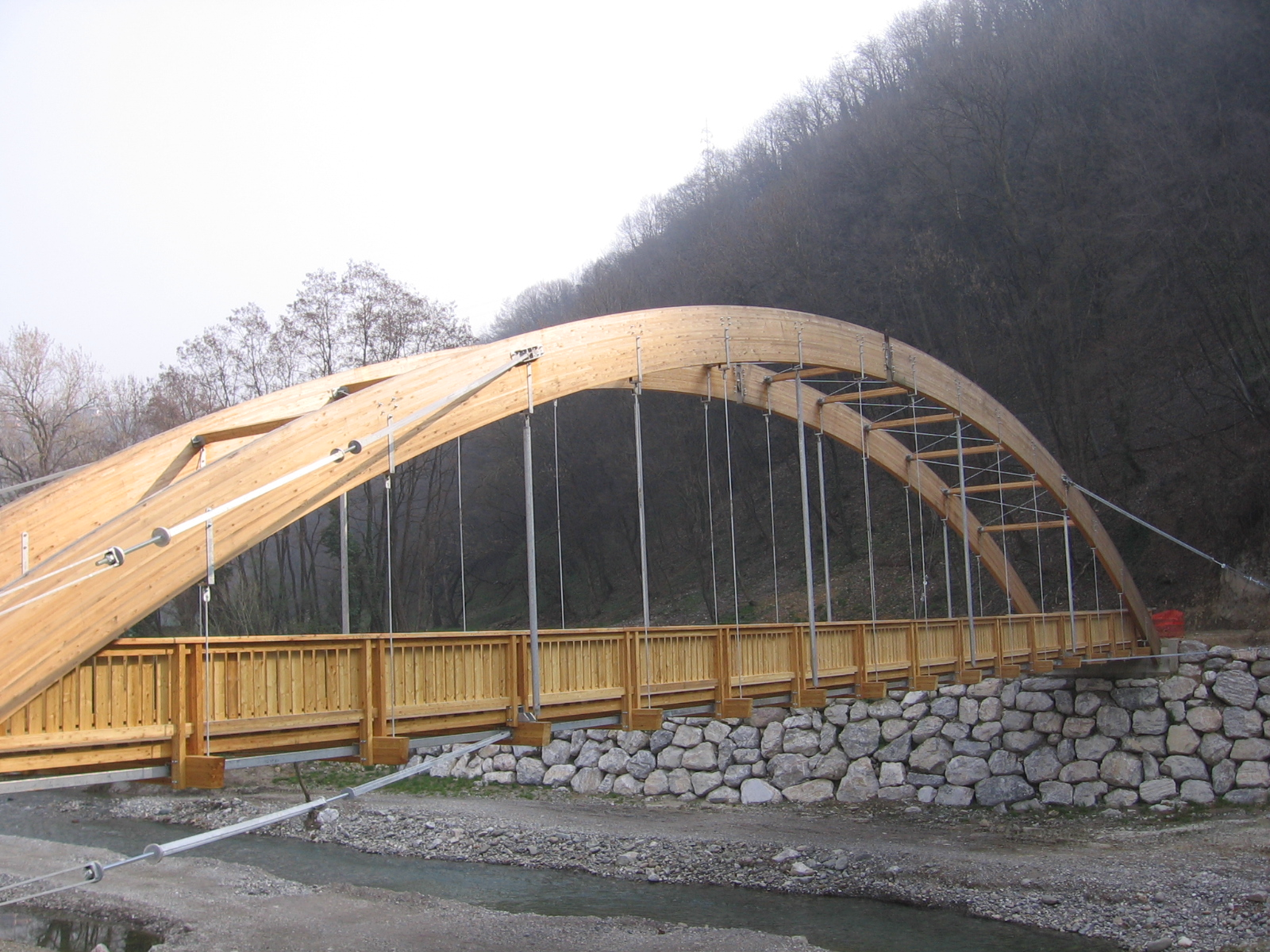 Vertova, Bergamo, Italia